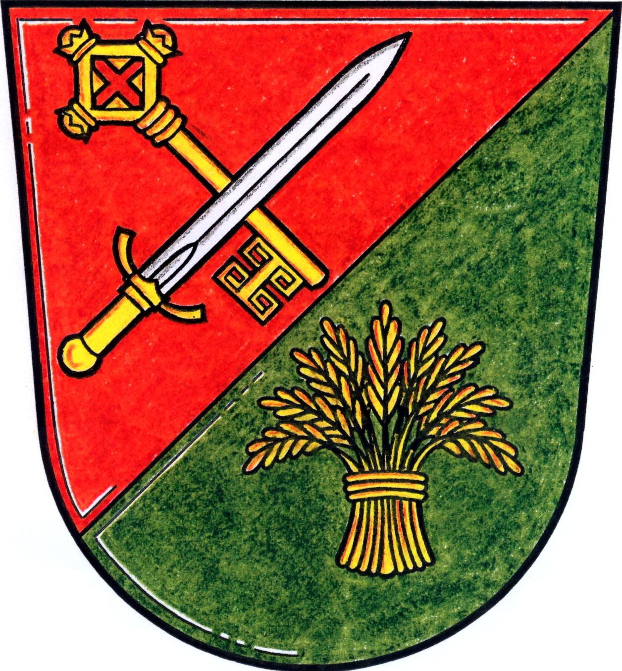 Česky: znak obce Hosín